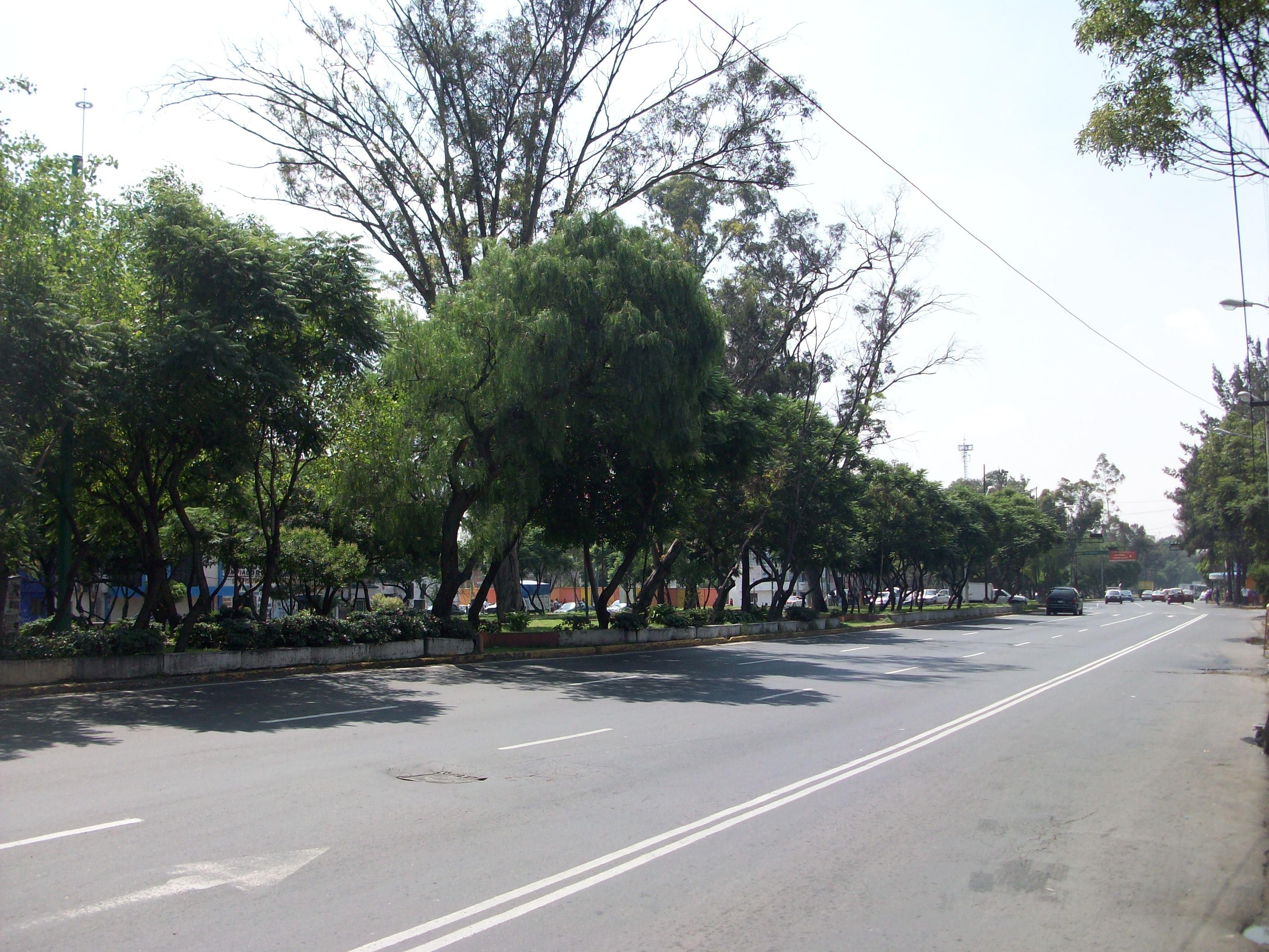 Avenida Eduardo Molina